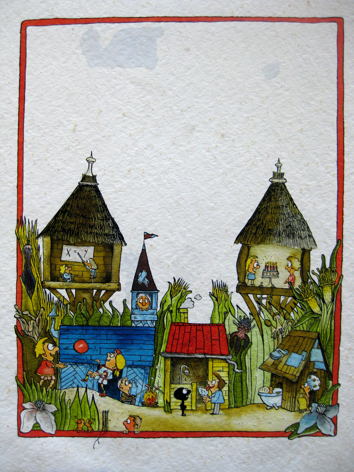 Ein Bild Rapallos aus dem Nachlass